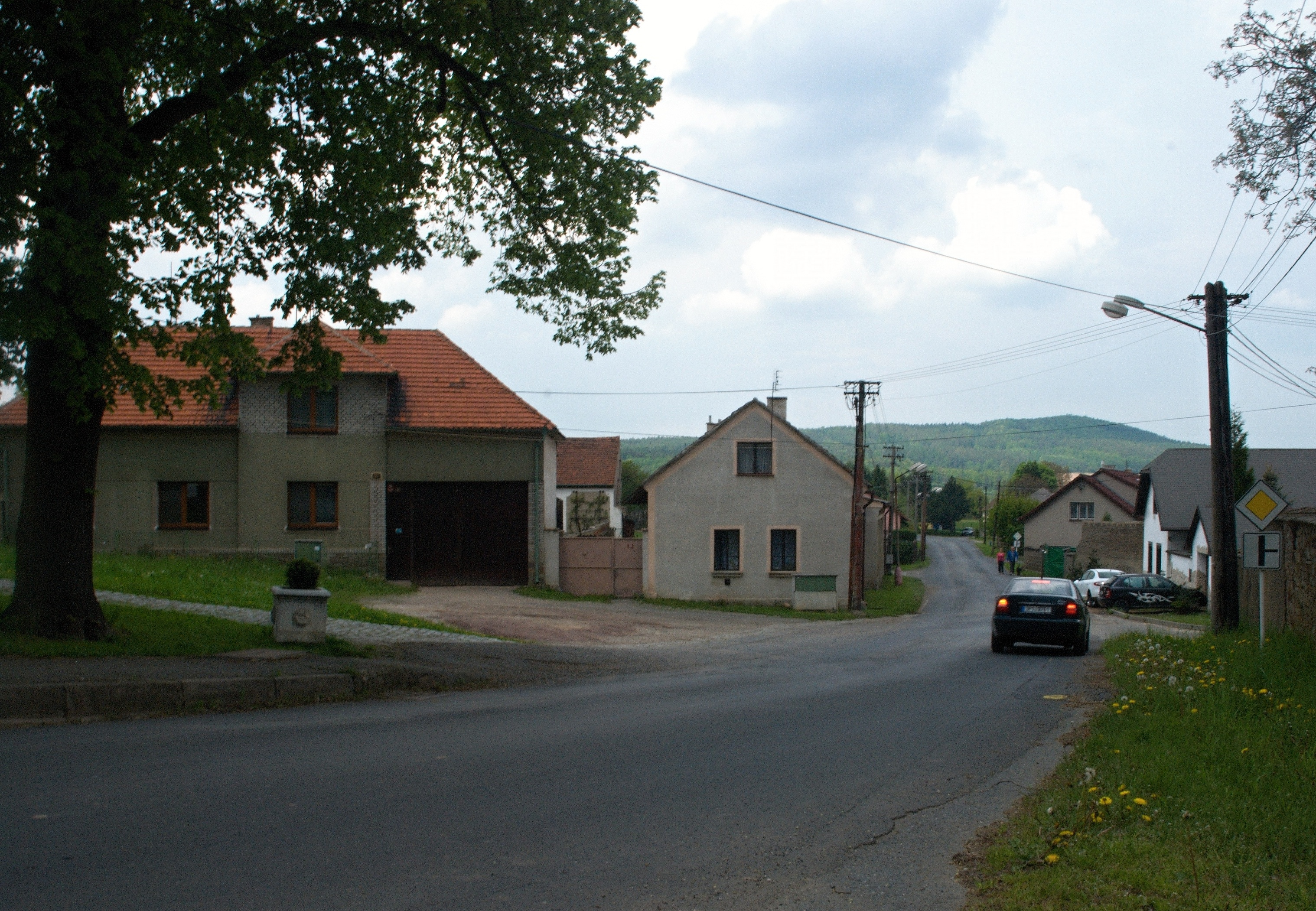 náves